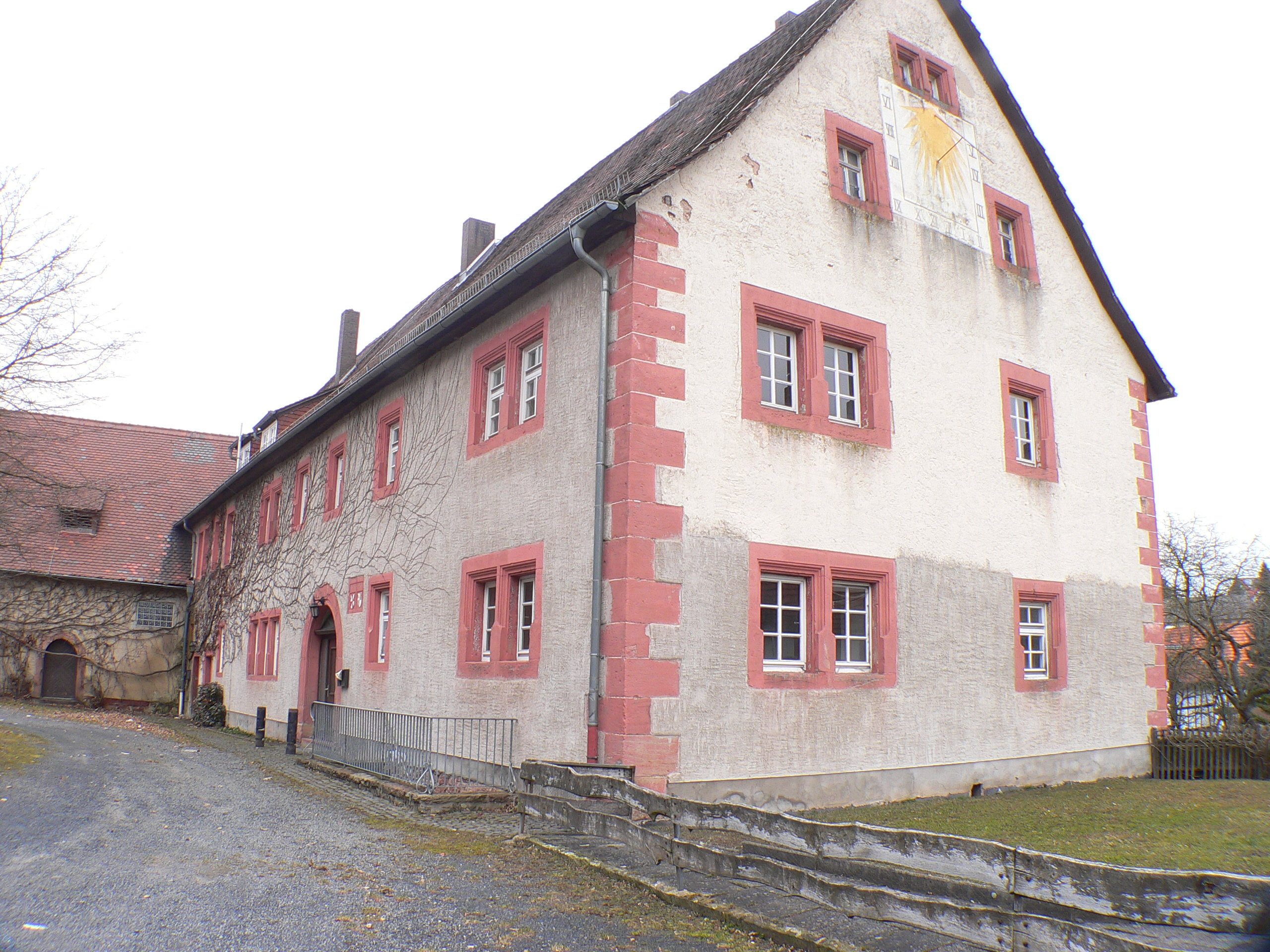 Oberes Mansbacher Schloss in Hohenroda-Mansbach, Hessen, Regierungsbezirk Kassel, Landkreis Hersfeld-Rotenburg